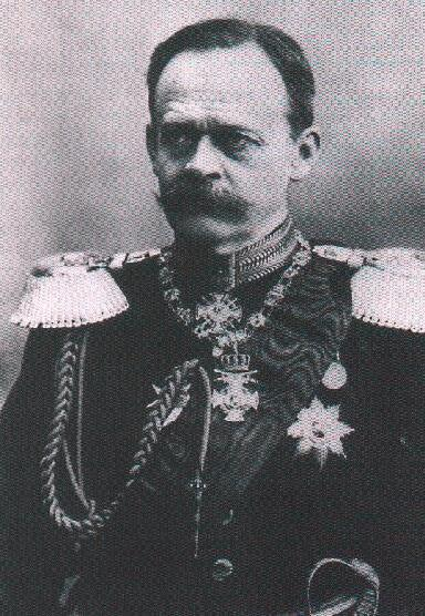 Portrait du diplomate Heinrich VII Reuss